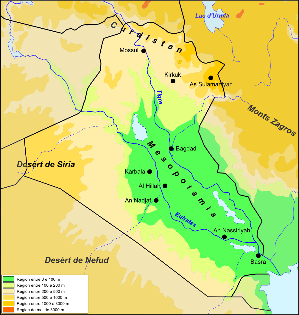 Topografia d'Iraq